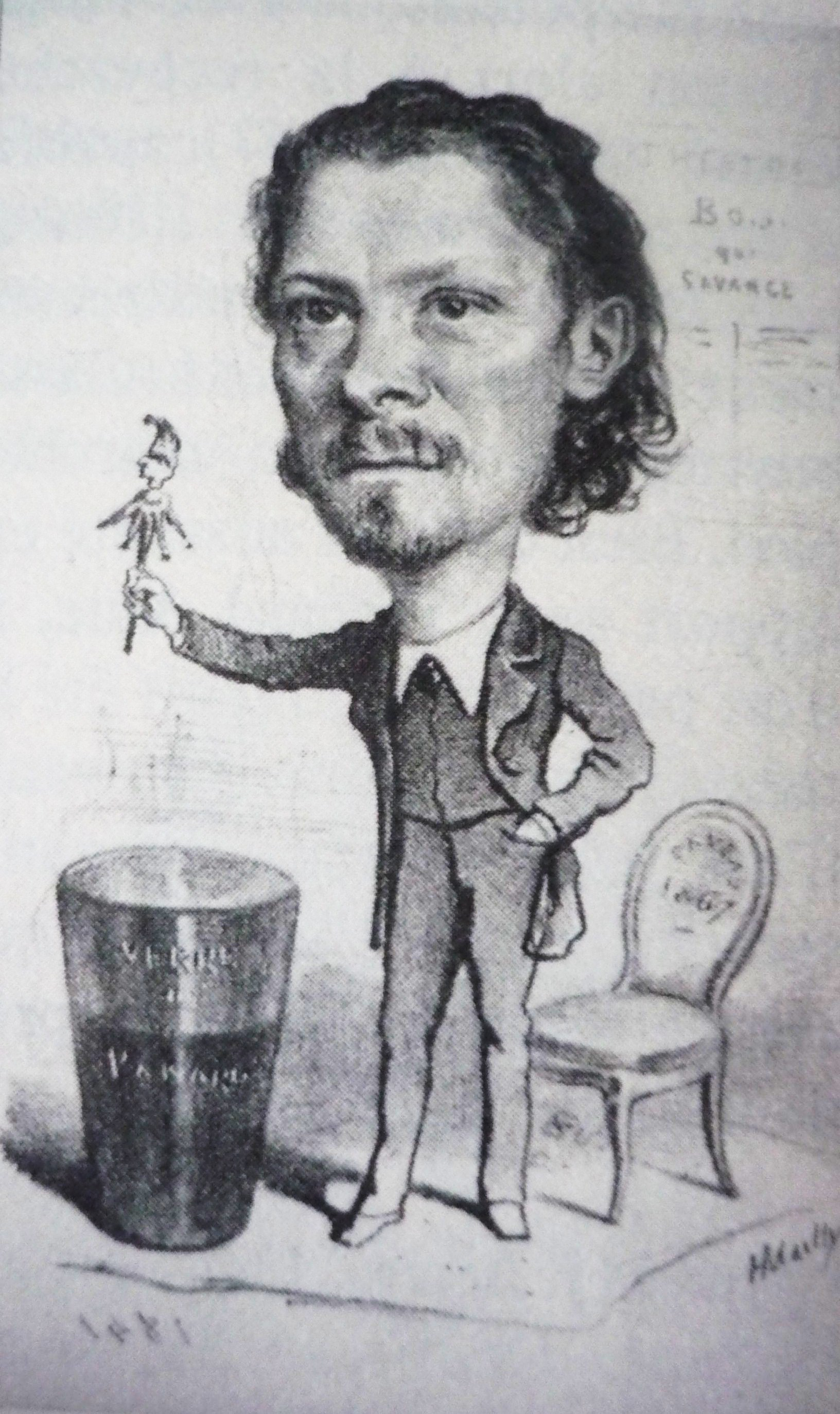 Portrait du goguettier Alexandre Flan.